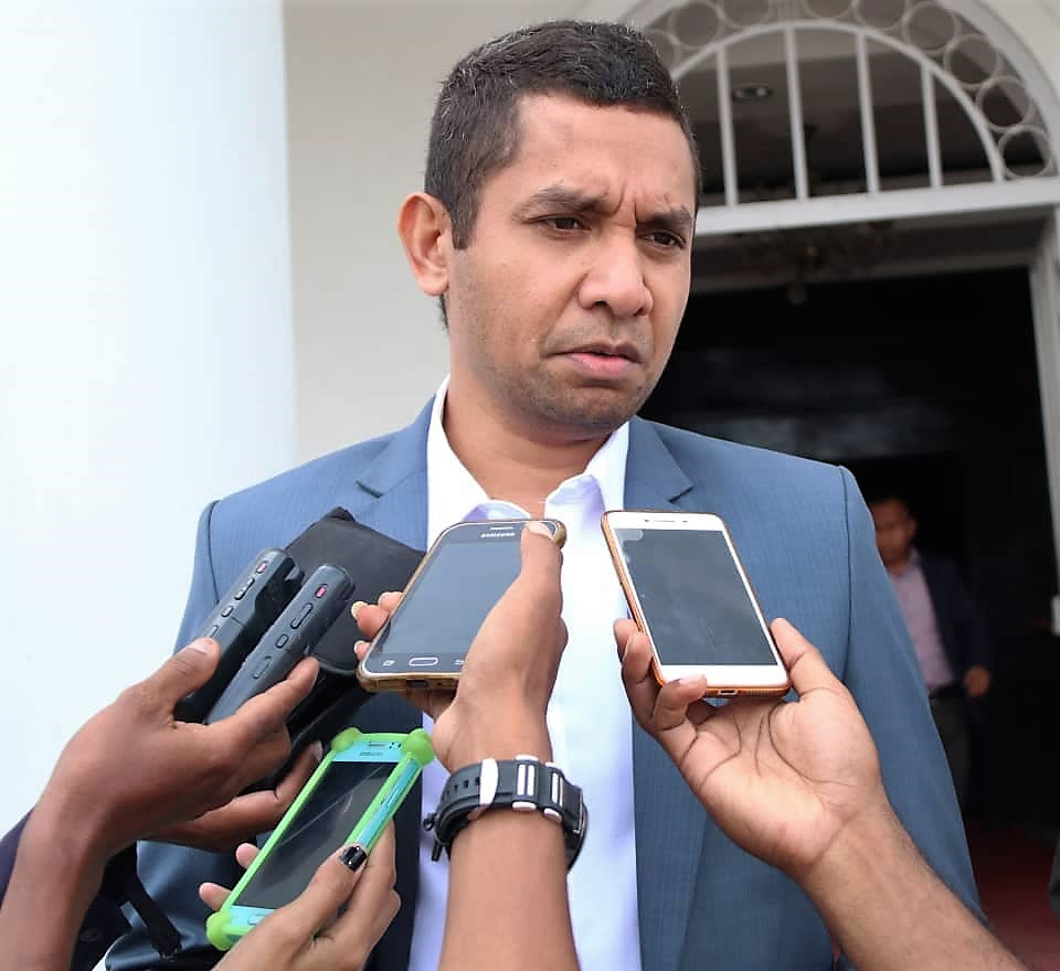 Salvador Eugénio Soares dos Reis Pires, Minister für öffentliche BauvorhabenTetun: Ministru Obras Públikas. Arq. Salvador Eugénio Soares Dos Reis Pires